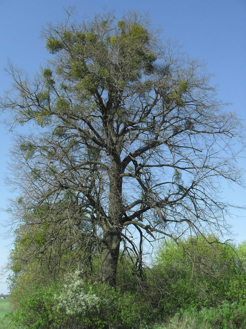 Lipa drobnolistna rosnąca na cmentarzu ewangelickim w Zalesiu.